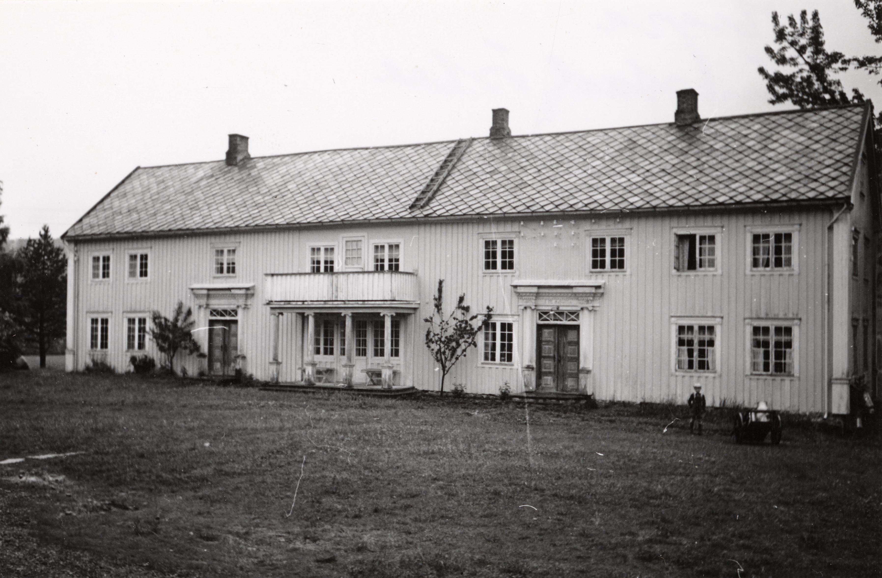 Ingstad Østre i Hegra, Nord-Trøndelag